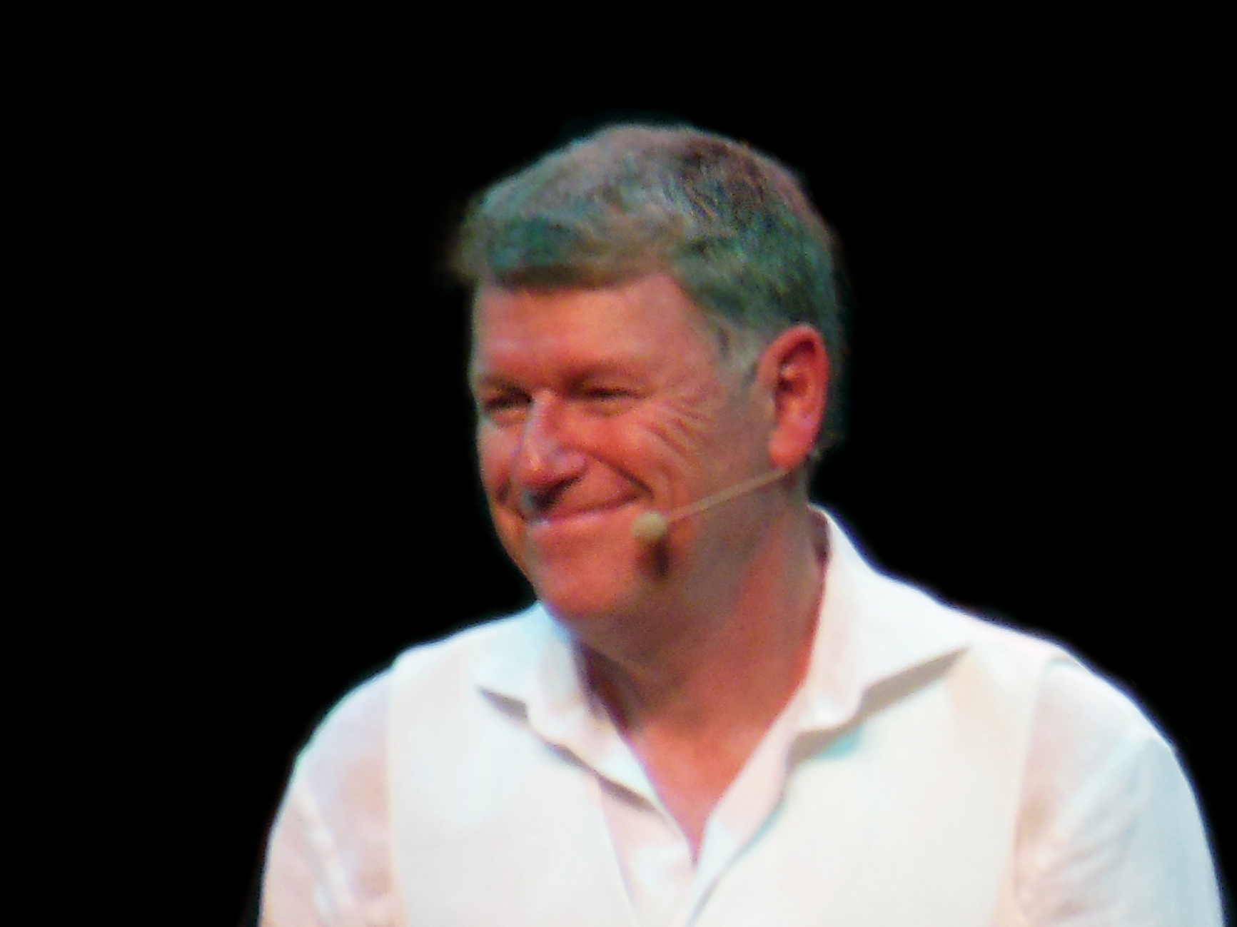 Jan Rippe i applådtacket efter en publikrepetition av föreställningen Spargrisarna kan rädda världen, 23 september 2015.